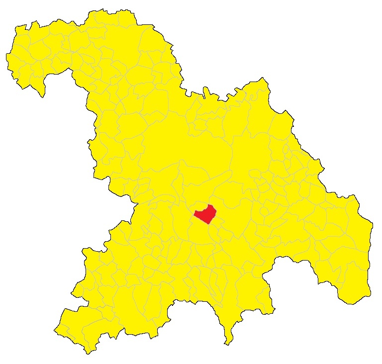 Mappa del comune di Basaluzzo (AL).